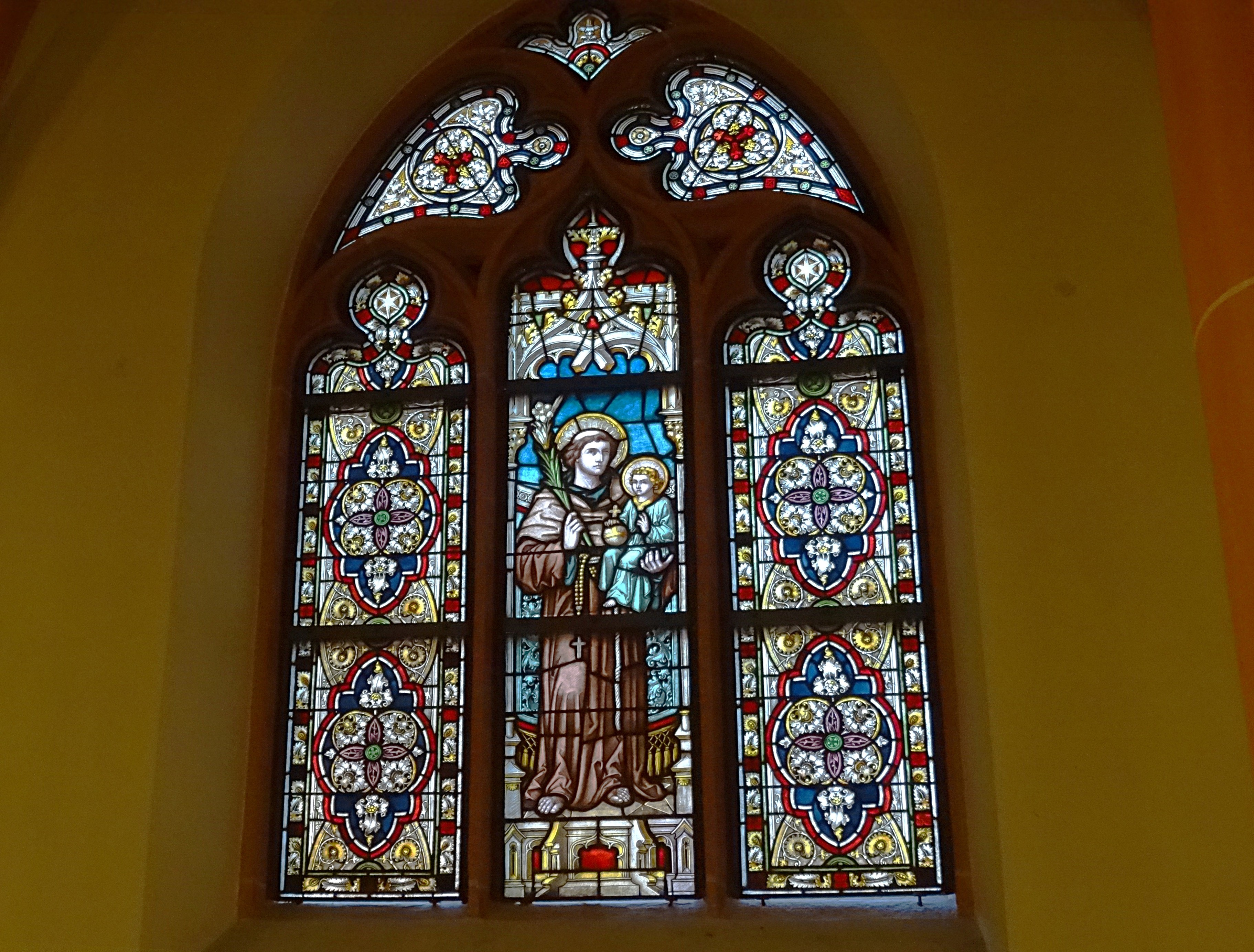 Bleiglasfenster über den Beichtstühlen in der Pfarrkirche St. Bonifatius Apolda mit dem hl. Antonius mit der Lilie und dem Jesuskind auf dem Arm.